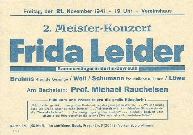 Progamm Frida Leider - Gestalterin des gesungenen Wortes - in Begleitung von Prof. Michael Raucheisen